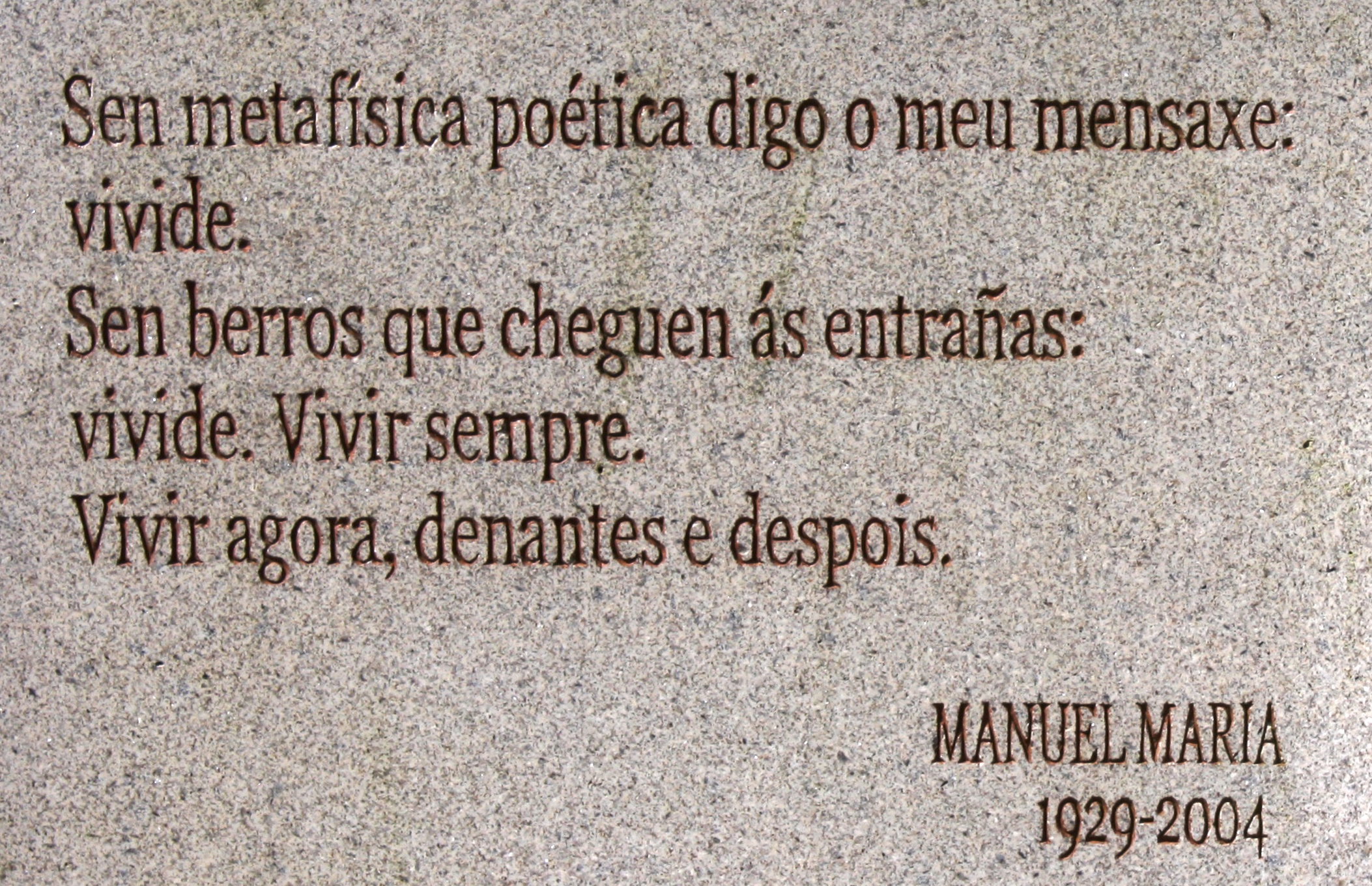 Placa na honra de Manuel María na Praza Maior de Lugo: Sen metafísica poética digo o meu mensaxe: vivide. Sen berros que cheguen ás entrañas: vivide. Vivir sempre. Vivir agora, denantes e despois.